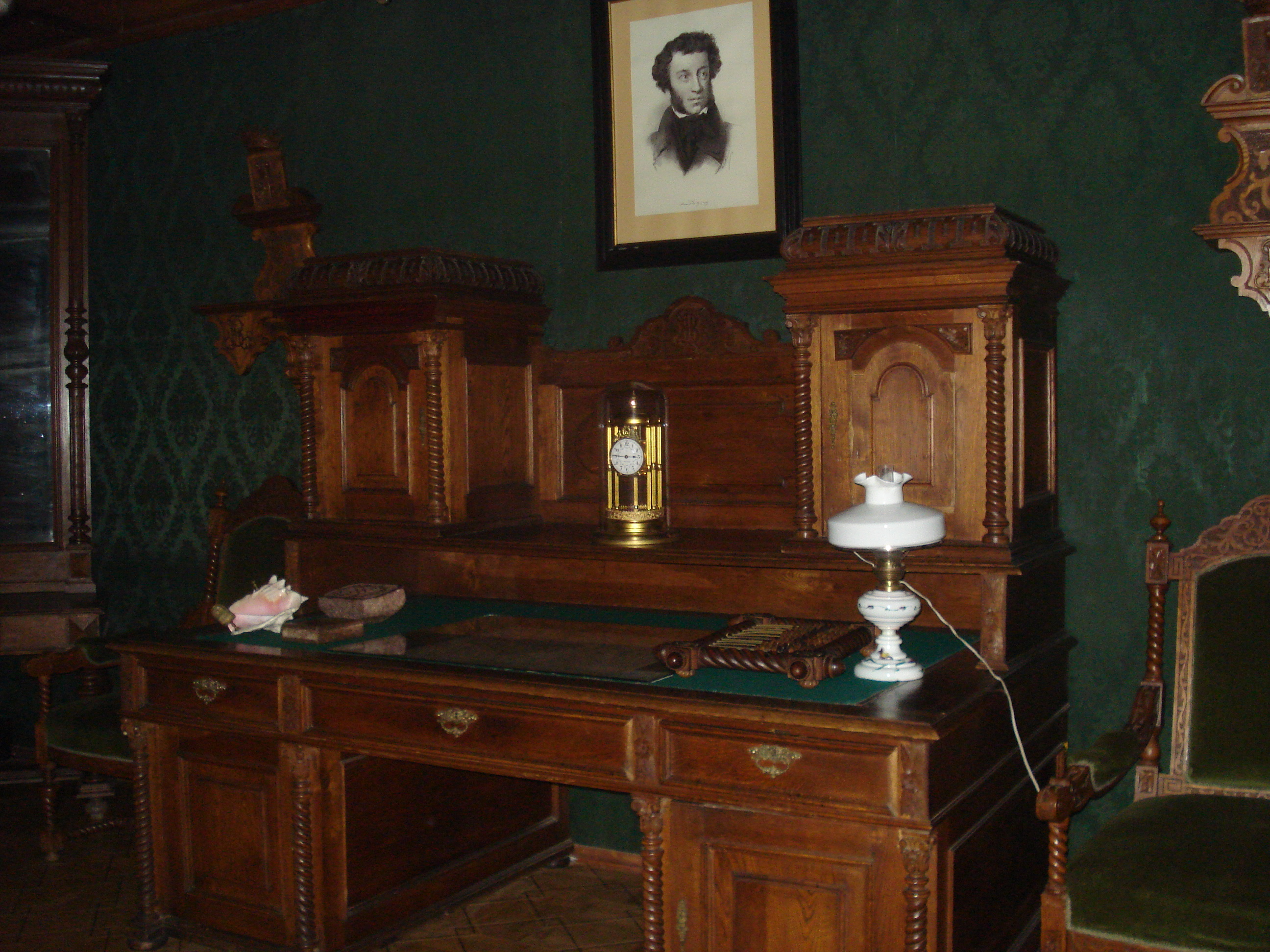 Grigory Pushkin's (1835-1905) study in the Alexander Pushkin Museum in Vilnius. Grigorijaus Puškino darbo kabinetas (Literatūrinis Aleksandro Puškino muziejus. Subačiaus g. 124)